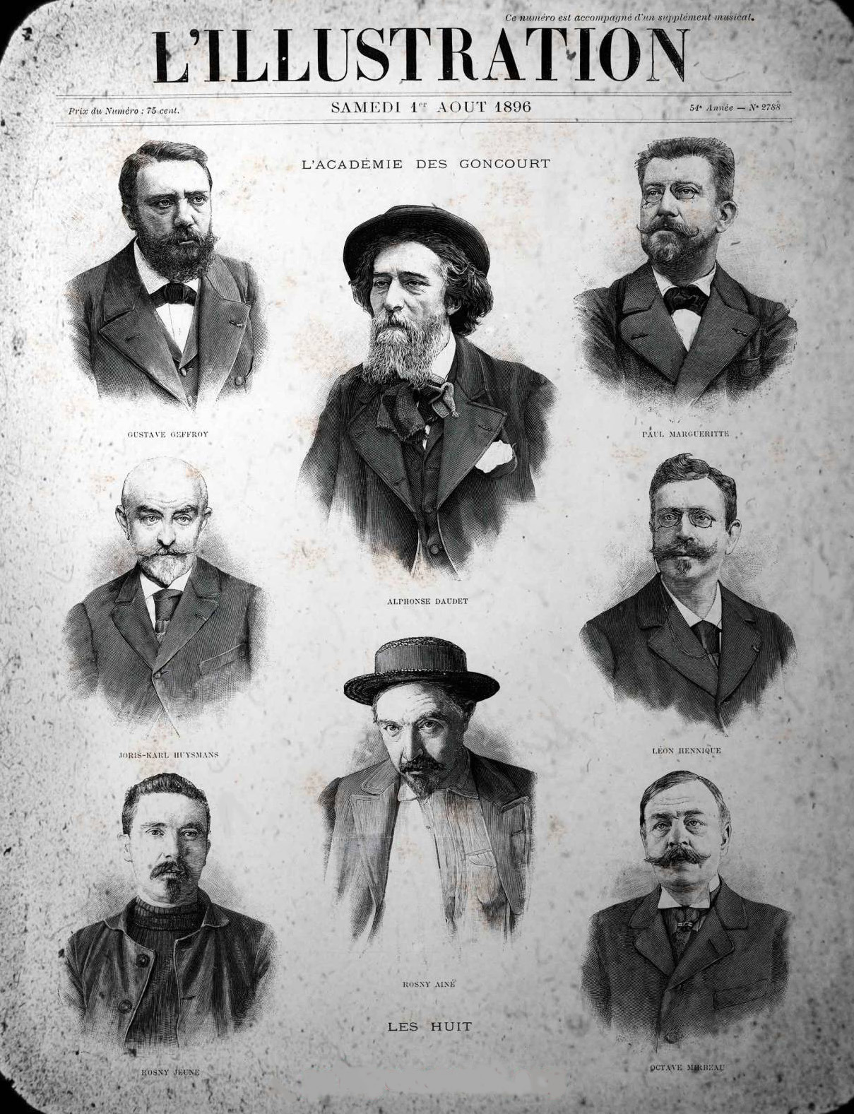 Les huit de l'académie Goncourt en 1896. L'Illustration, samedi 1er août 1896, n° 2788 (54e année)